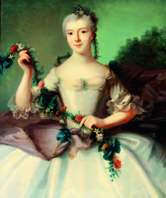 Portrait de Flore d'Arenberg (1752-1832), fille de Charles Marie Raymond d'Arenberg et duchesse d'Ursel